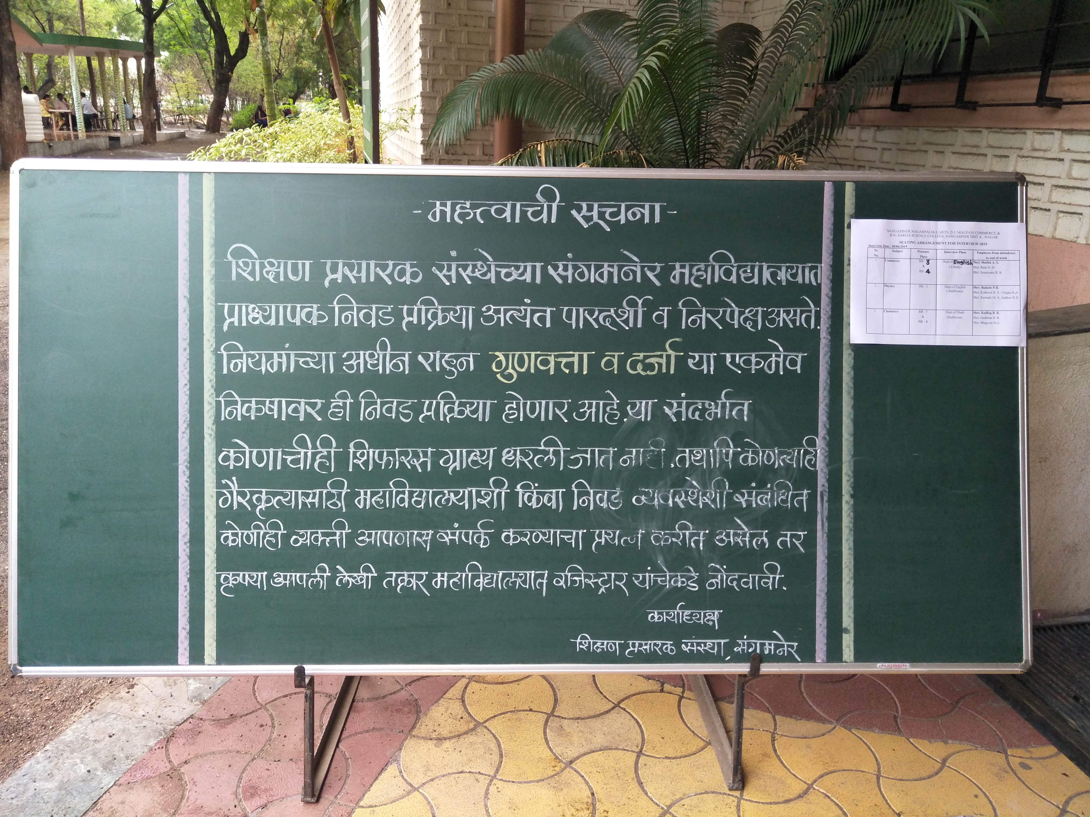 संगमनेर महाविद्यालयाची पारदर्शकता पुरावा